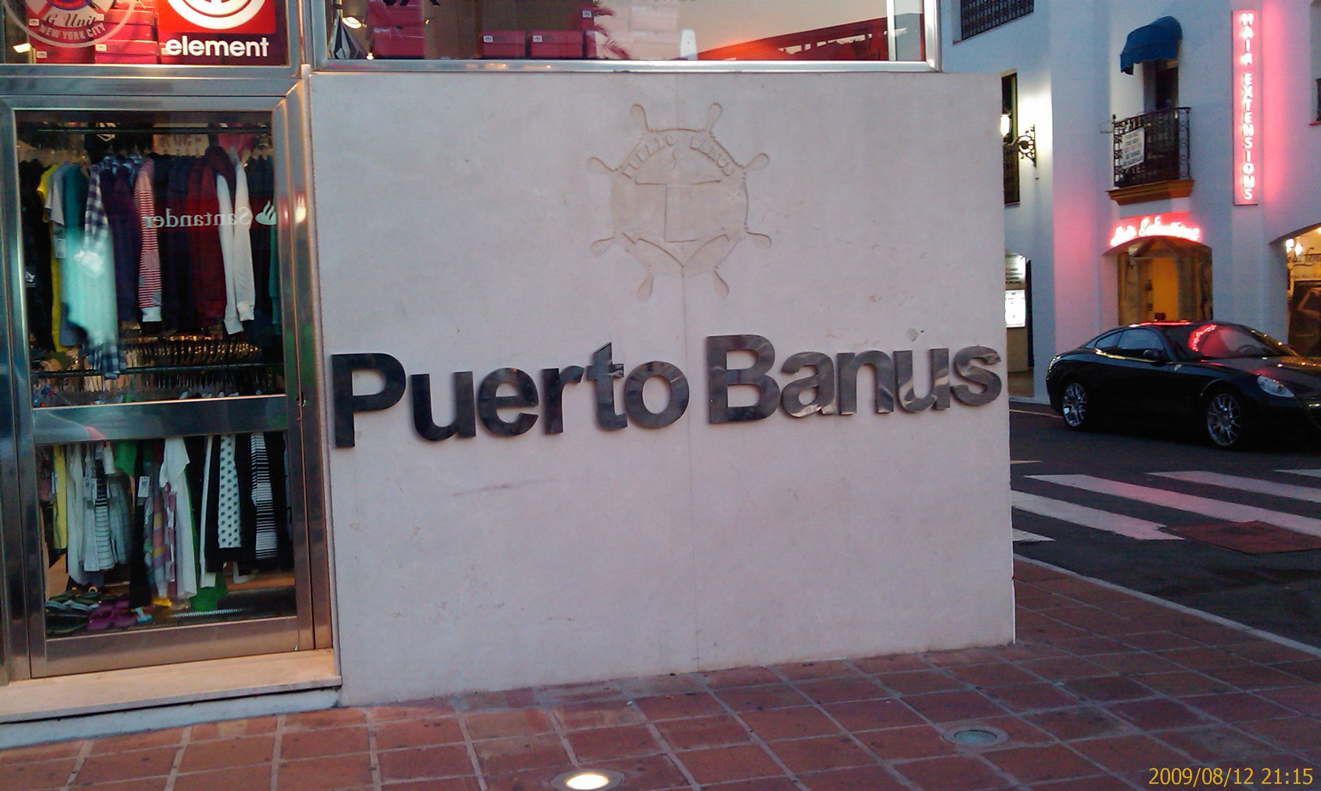 Skylten man möts av vid ingång till hamnområdet i Puerto Banus